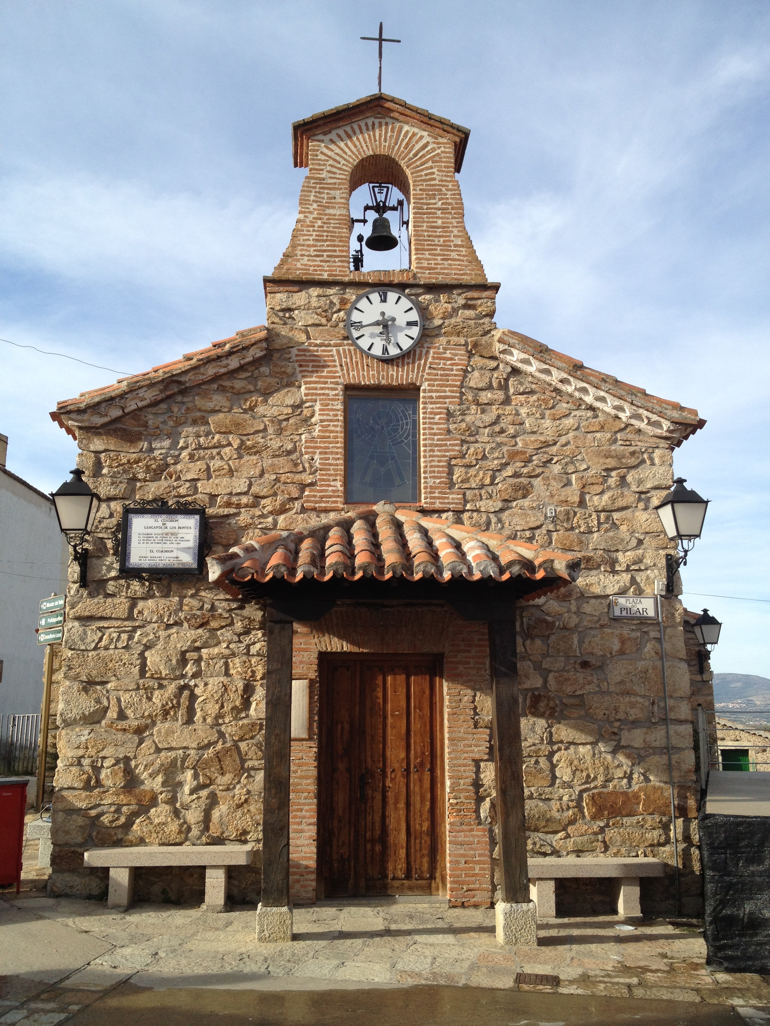 Vista principal de la Iglesia de El Cuadron